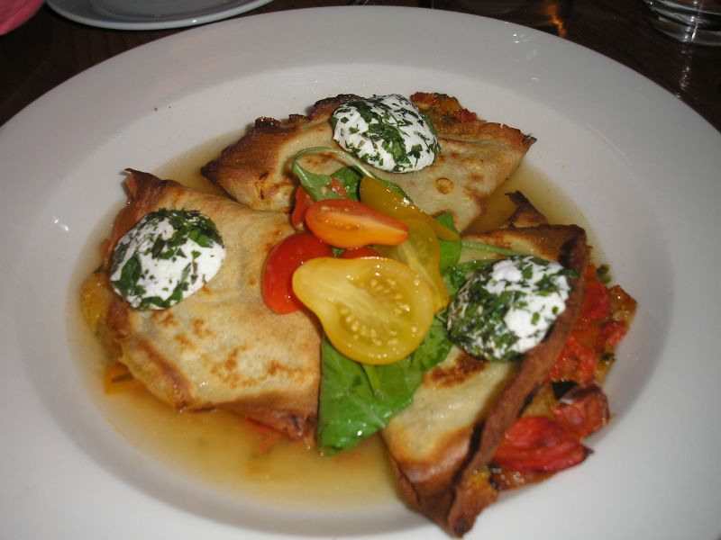 Crèpes fourrées à la ratatouille